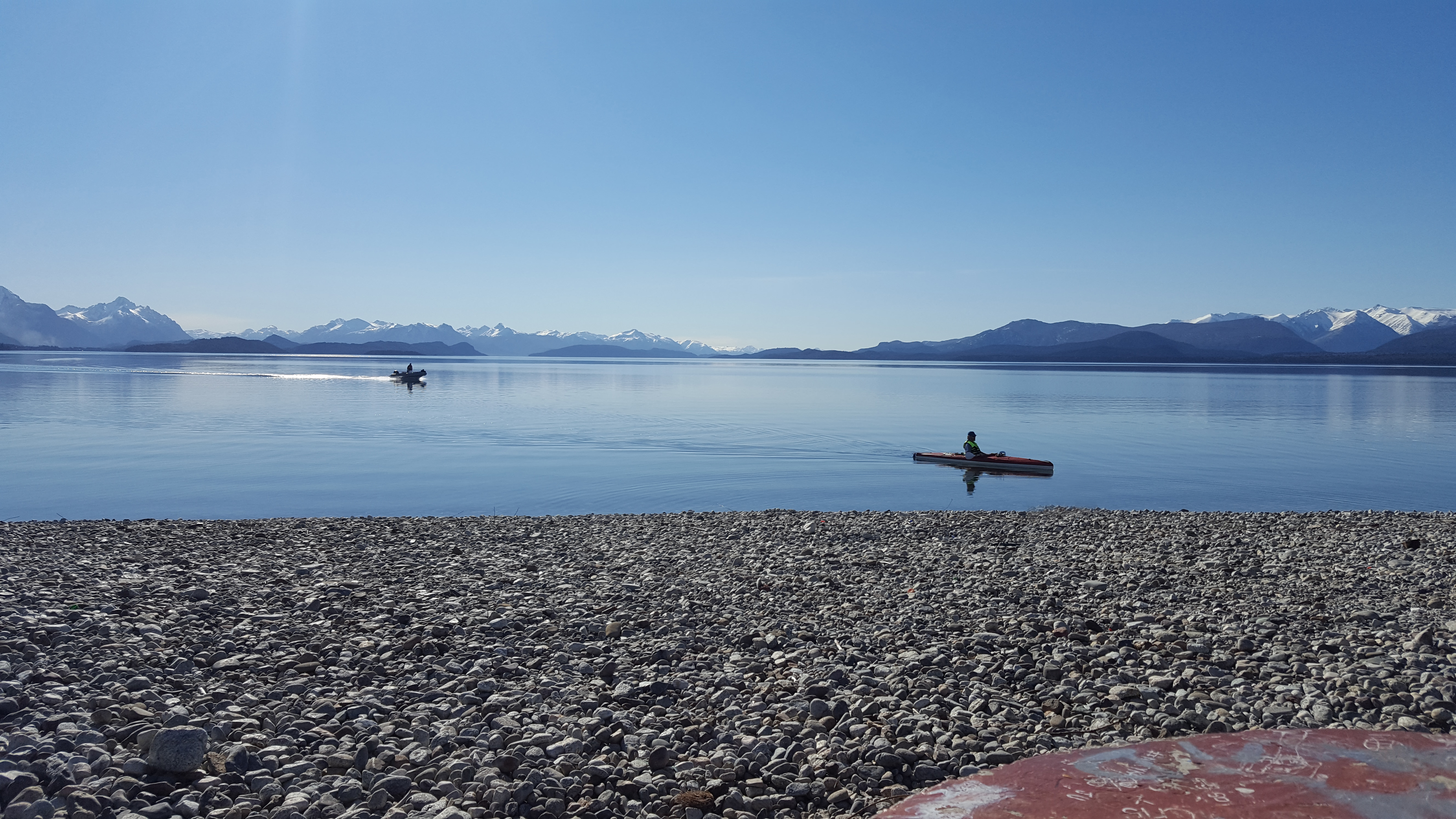 Vista Playa Centenario Lago Nahuel Huapi